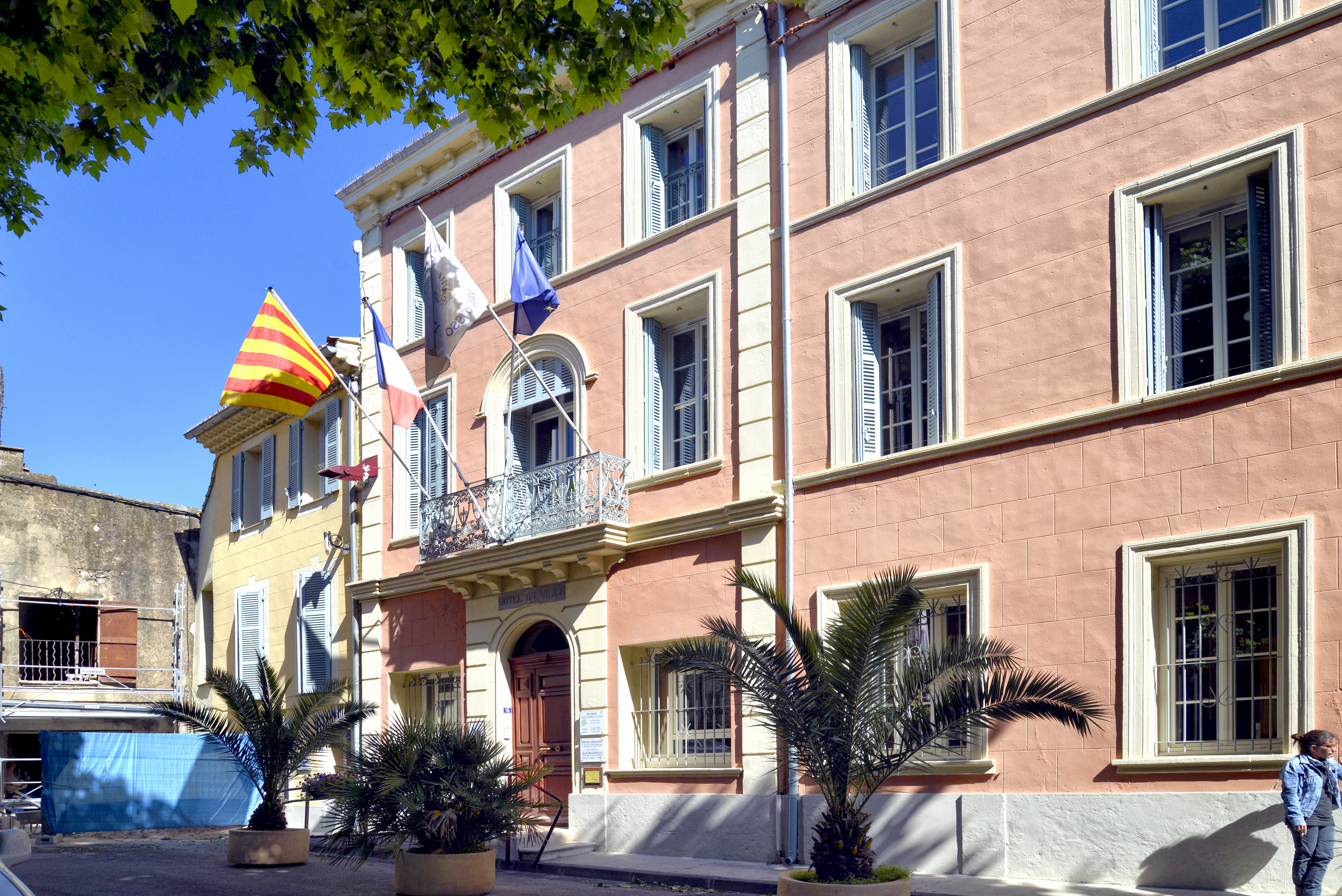 Garéoult, Var (France)